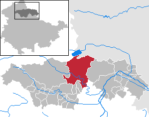 Kyffhäuserland in Thuringia - Kyffhäuserkreis